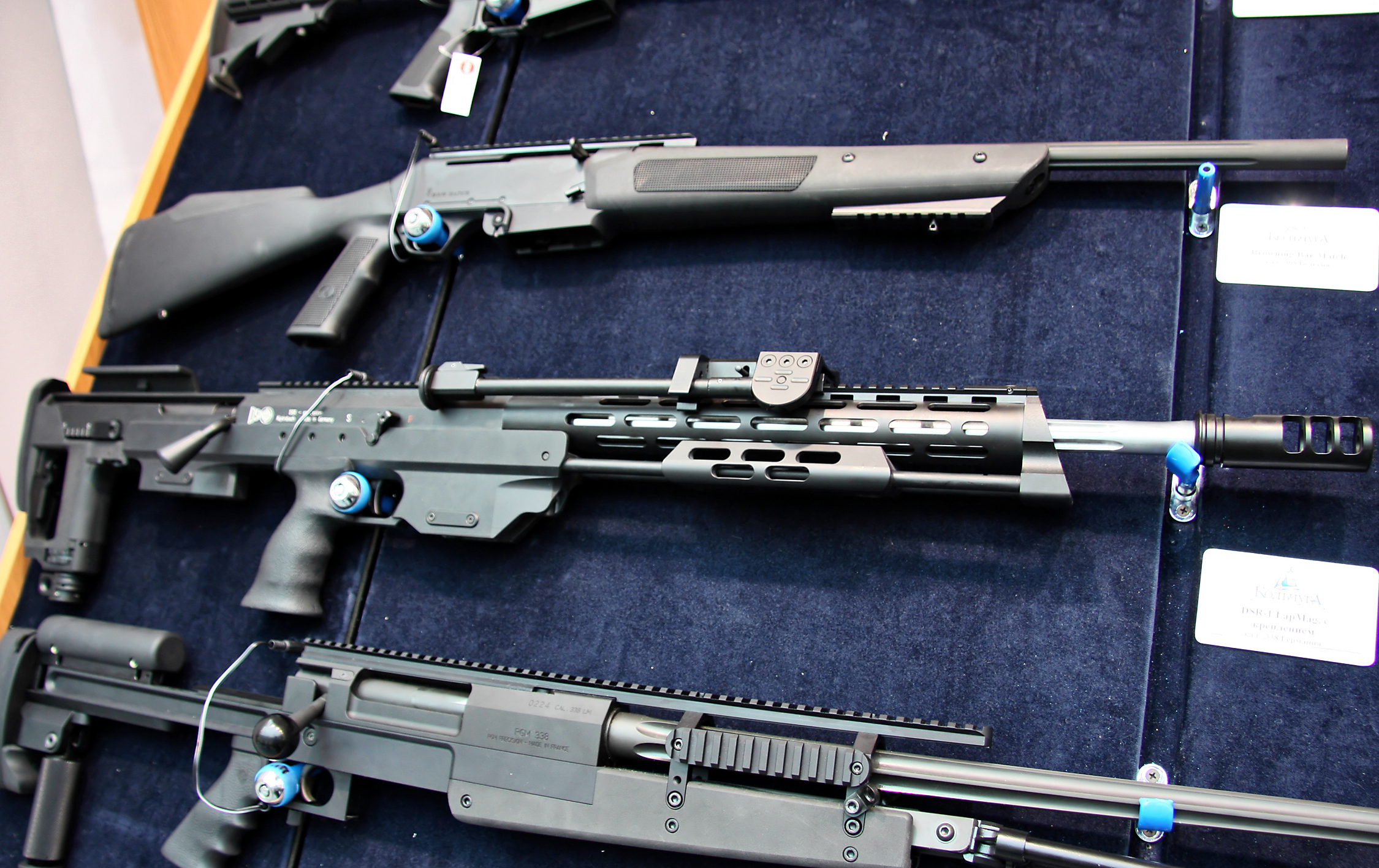 Снайперская винтовка DSR-1 .338 Lapua Mag (DSR-1 .338 Lapua Mag sniper rifle)